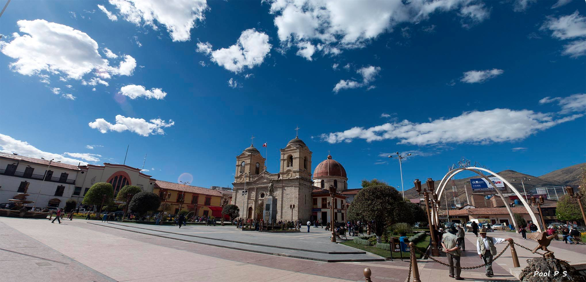 Panorámica de Plaza Constitución - Huancayo